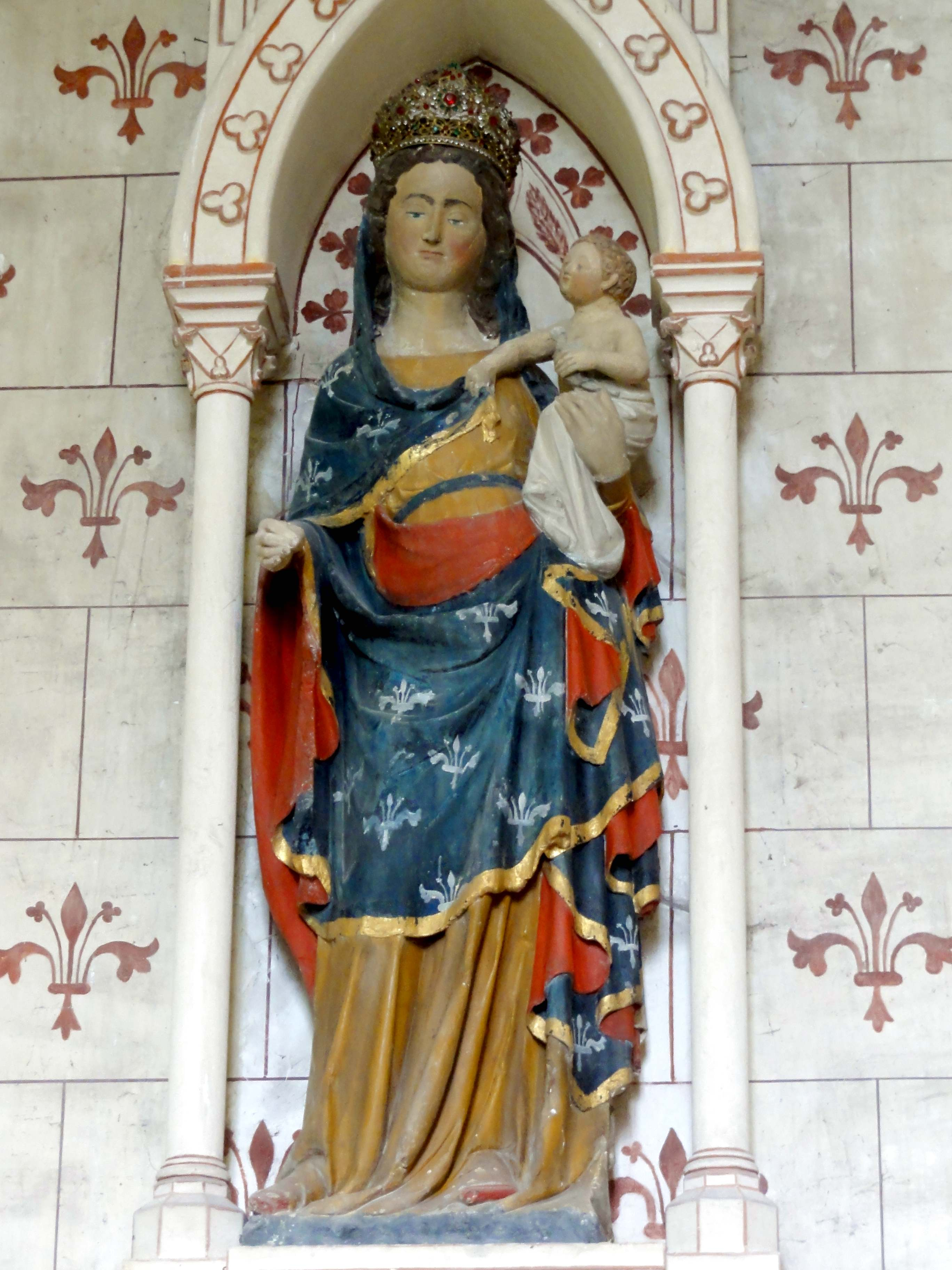 Vierge à l'Enfant.